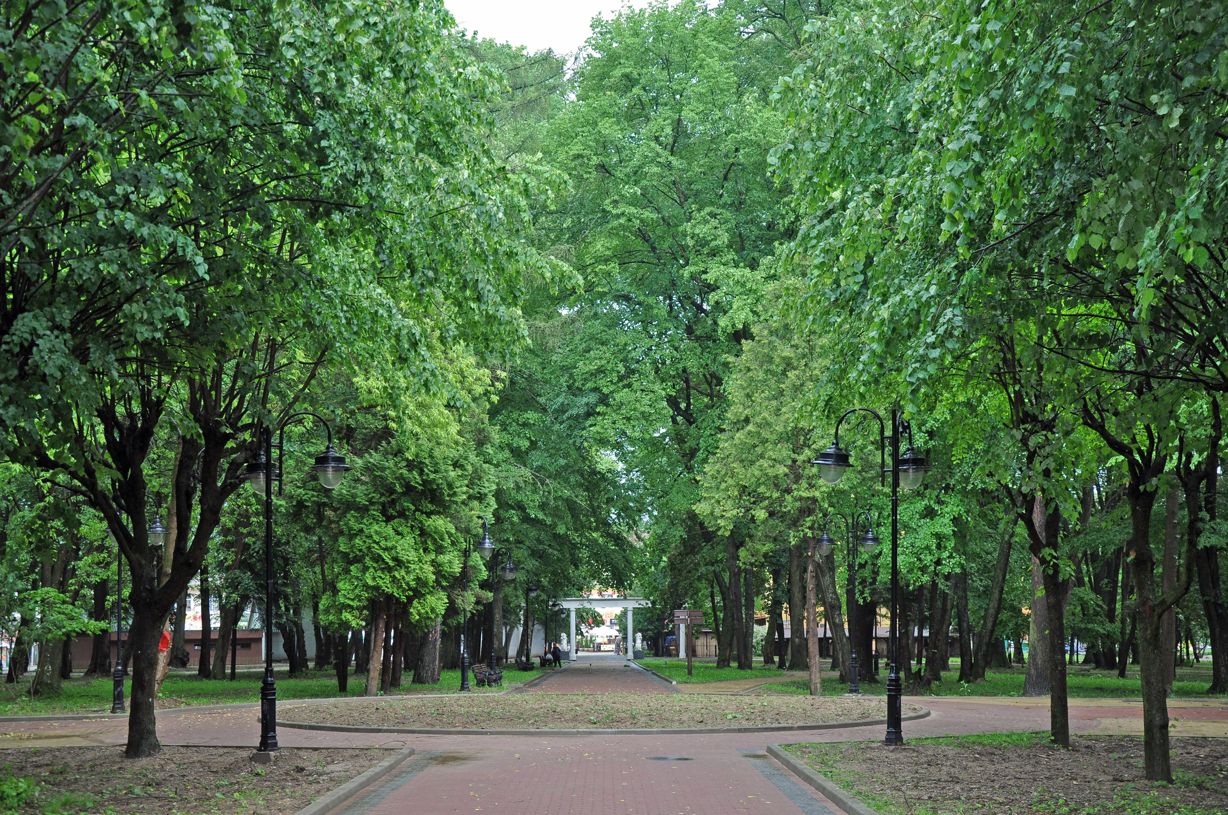 Курортний парк, Стрийський р-н, м. Моршин